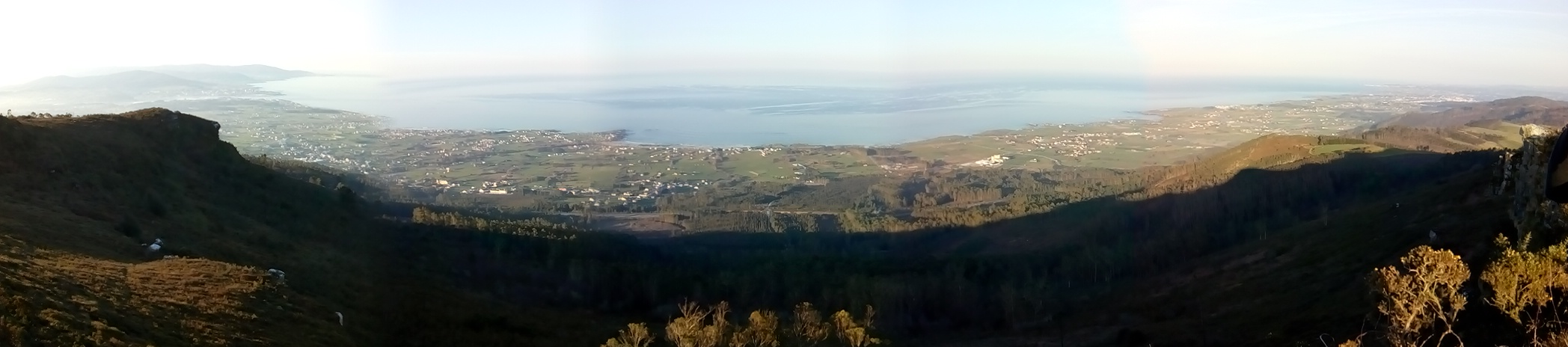 Vista panorámica dende o Chao do Comado, dende Burela (á esquerda da imaxe) a Tapia de Casariego (á dereita)